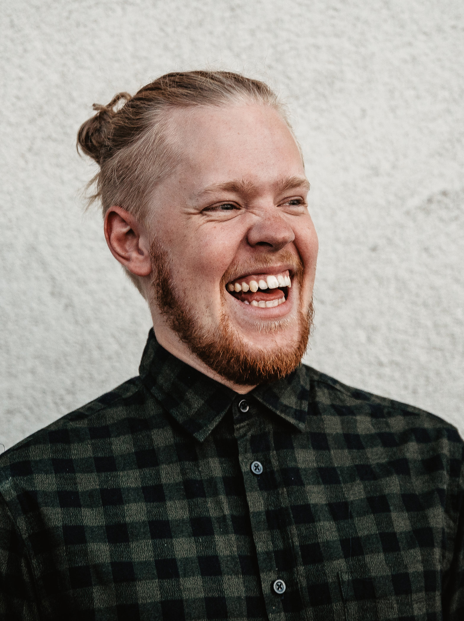 Portrait Marius Theobald 2018